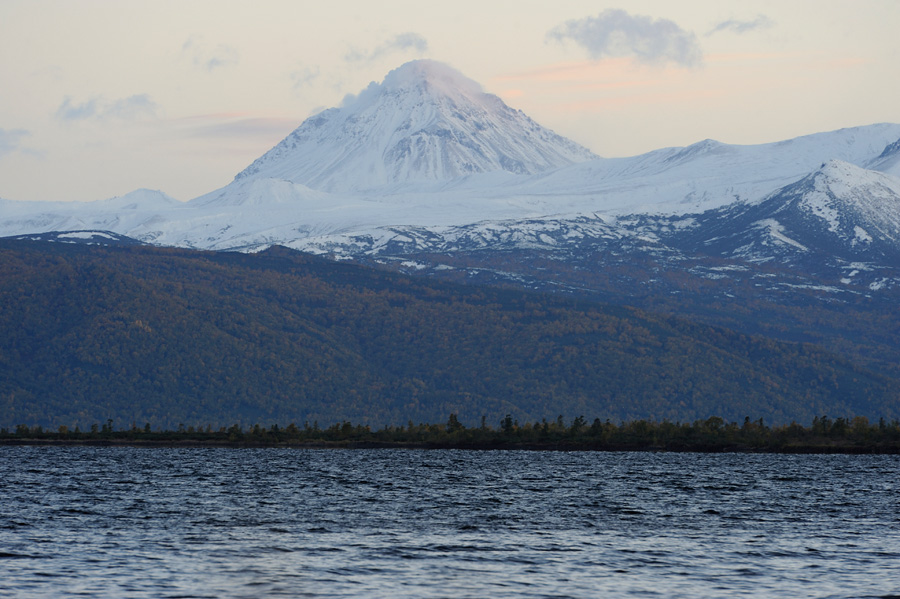 Вулкан Кизимен за Кроноцким озером